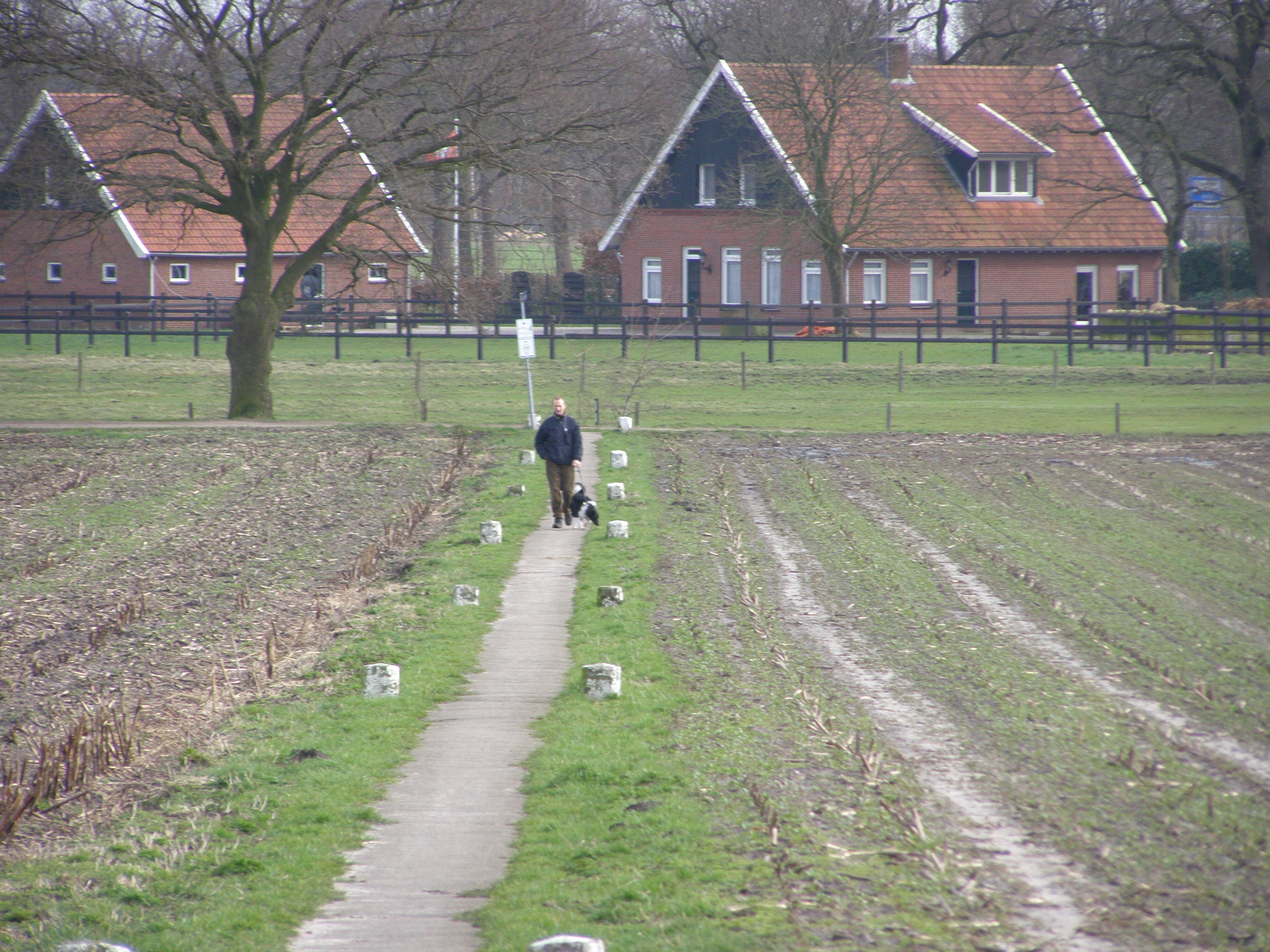 eigen werk